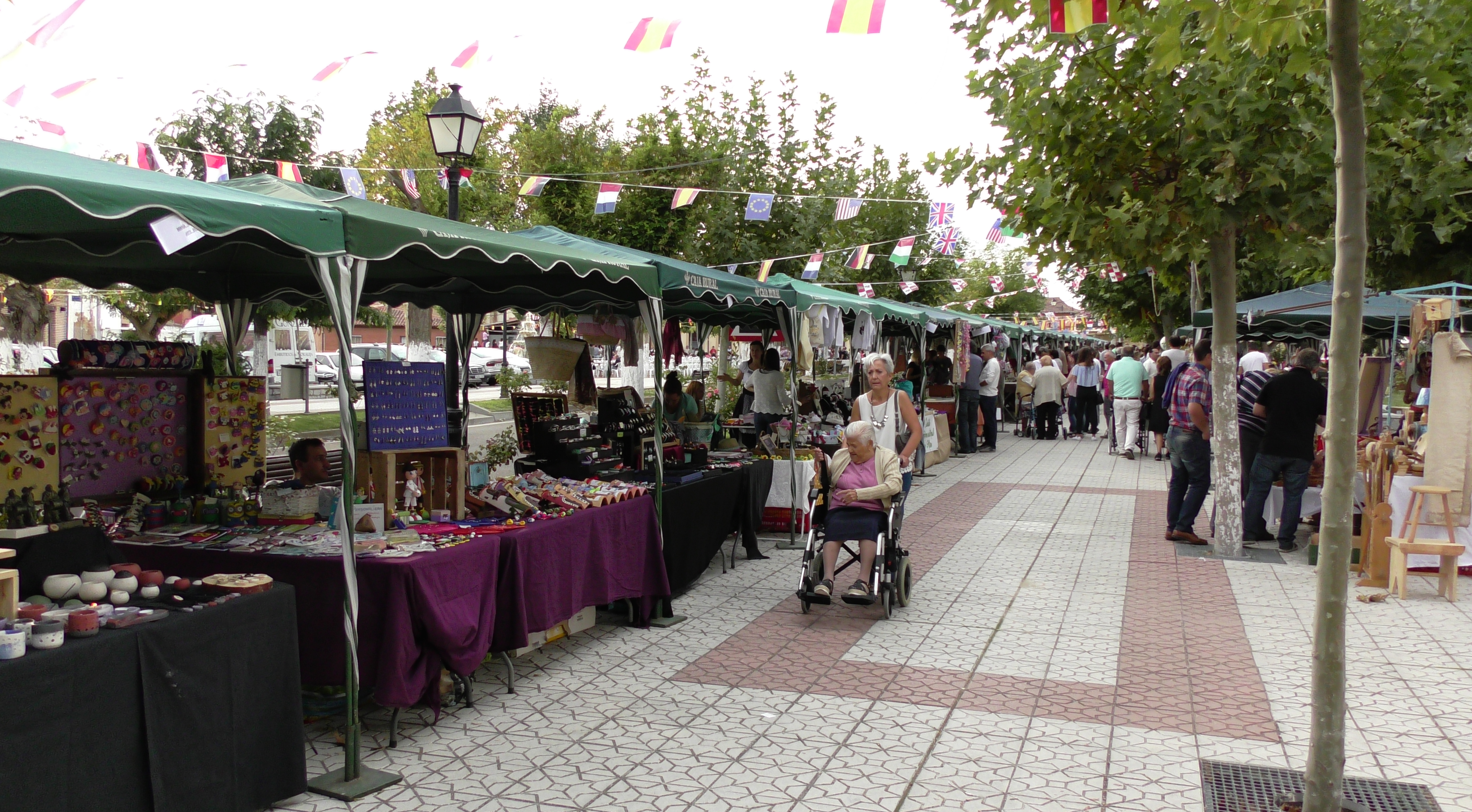 Moraleja del Vino